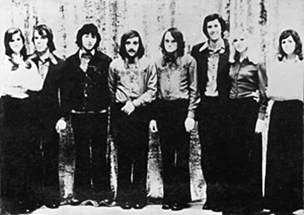 1974 год. Первые гастроли группы в Воронеже. Слева направо: О.Данилович, С.Грачев, С.Намин, Ю.Фокин, А.Слизунов, К.Никольский, Н.Палицина, Т.Воронцова (вокальное трио, бэк-вокал)